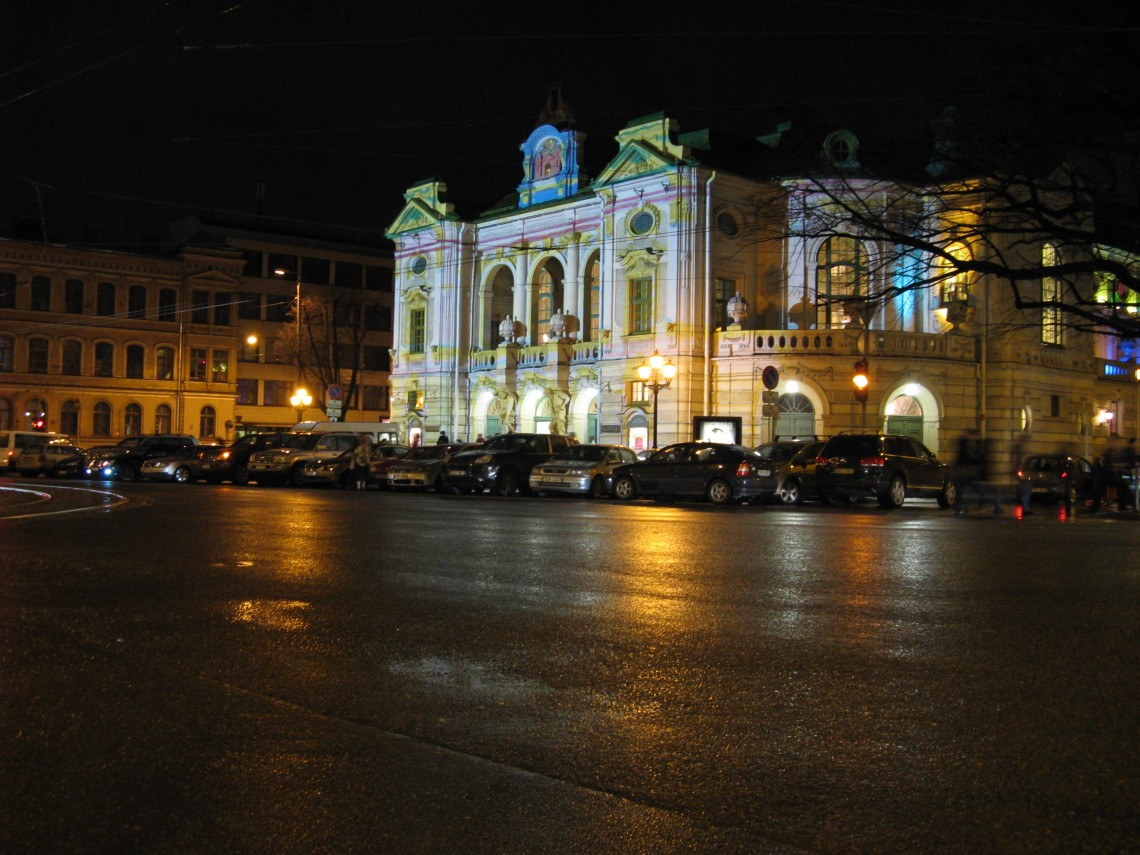 Nacionālais teātris. Staro Rīga